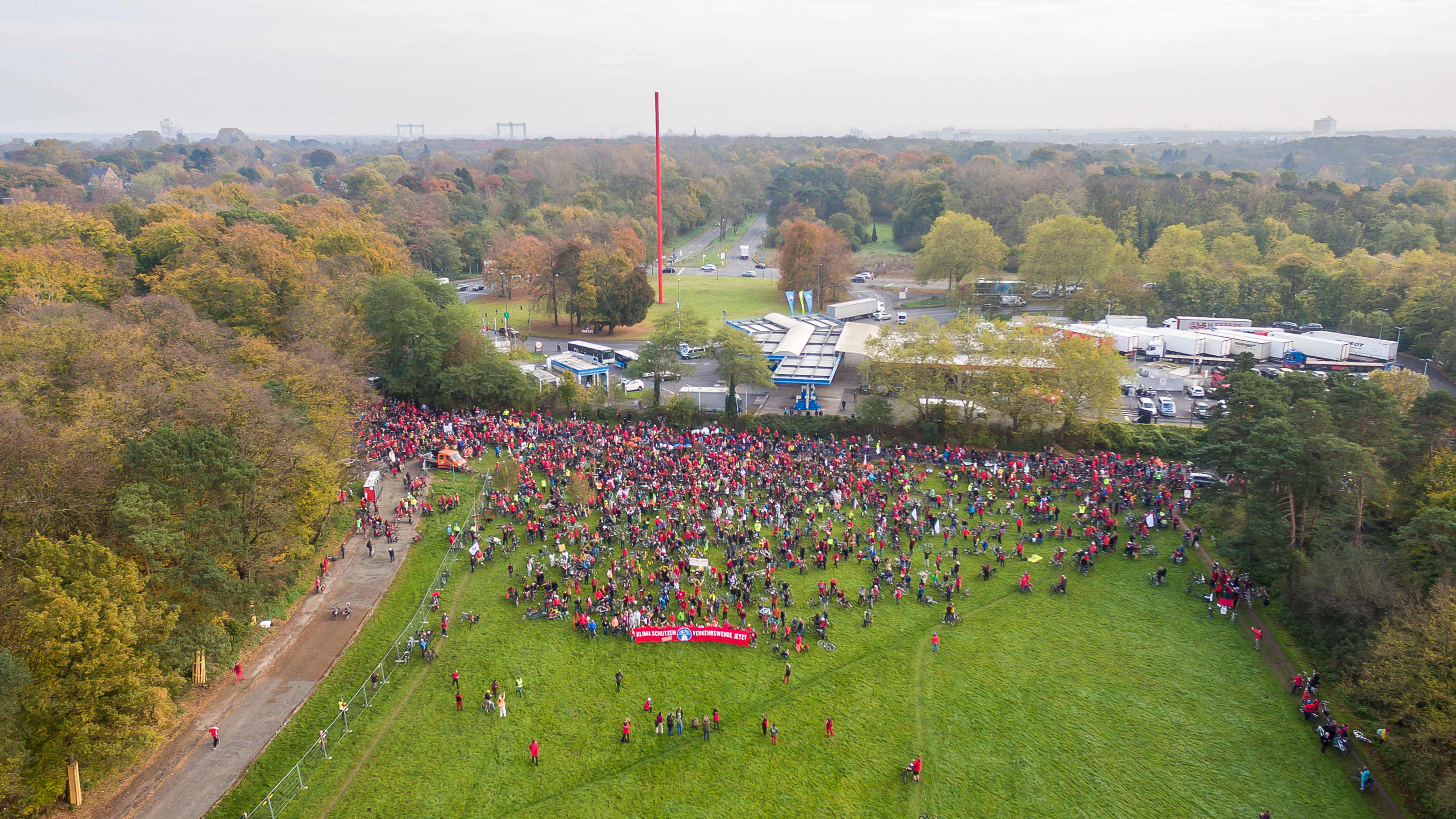 Pedal the highway! - Fahrraddemo zur Klimakonferenz - Auftaktkundgebung am Verteilerkreis Köln